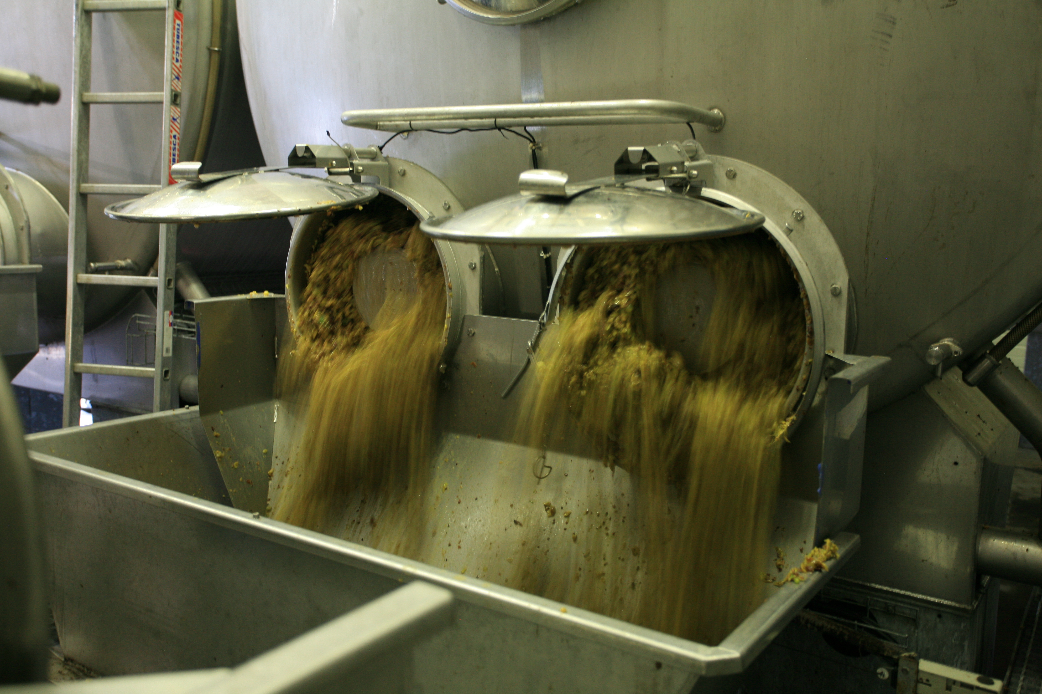 Weißweinmaische nach der Enzymierung